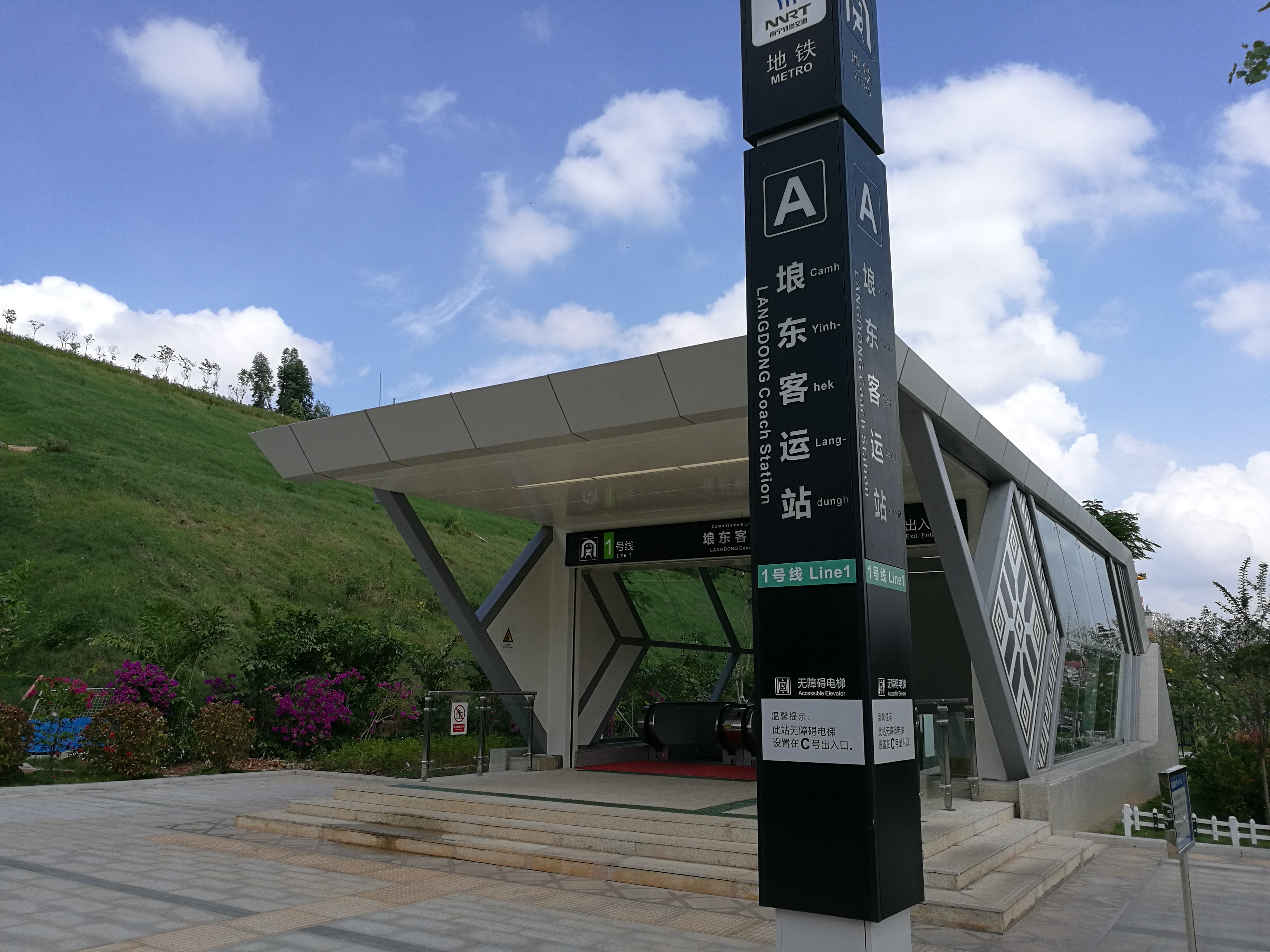 南宁轨道交通埌东客运站